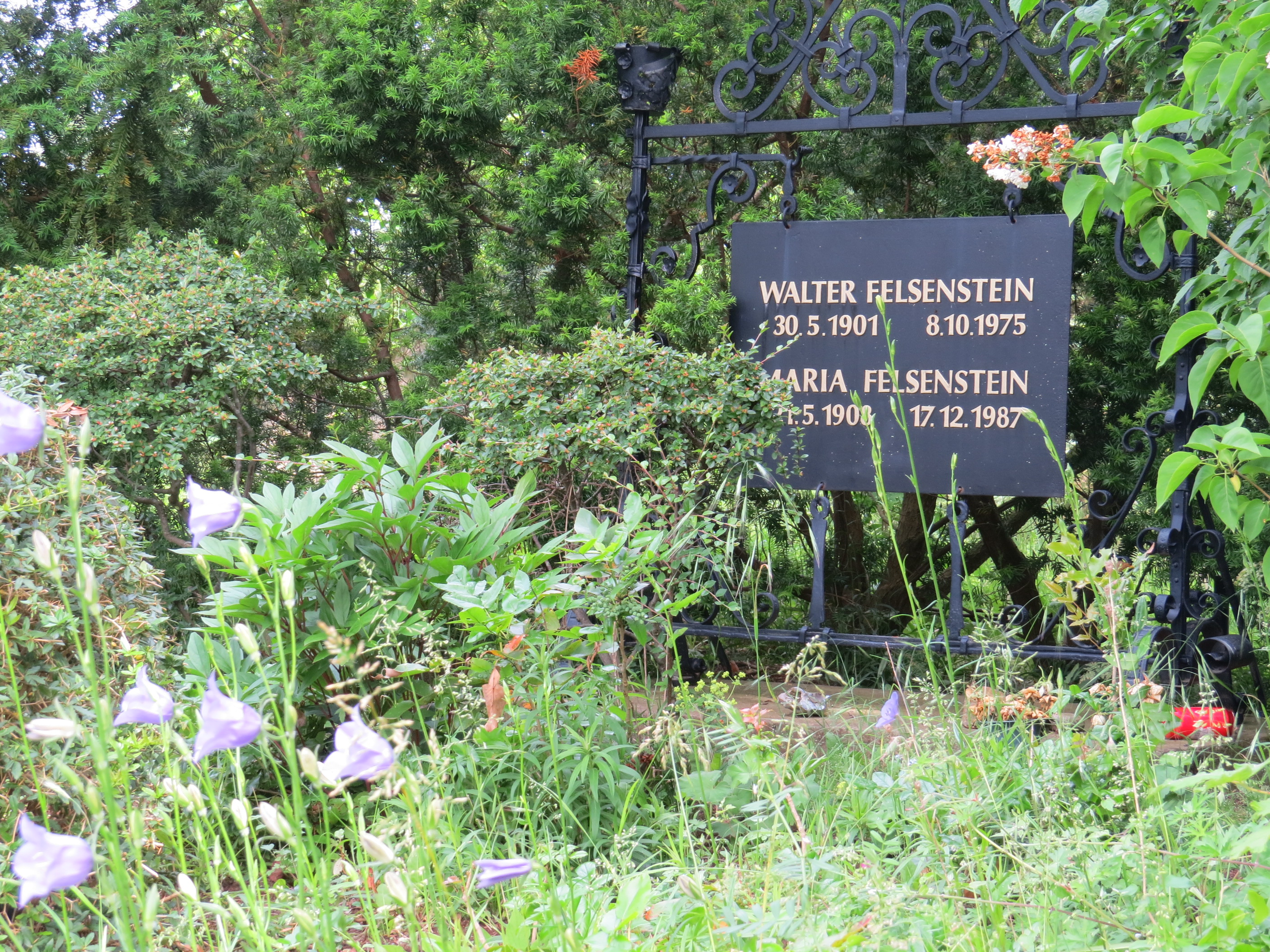 Hiddensee, Ort Kloster, Inselfriedhof, Grabstätte Familie Felsenstein